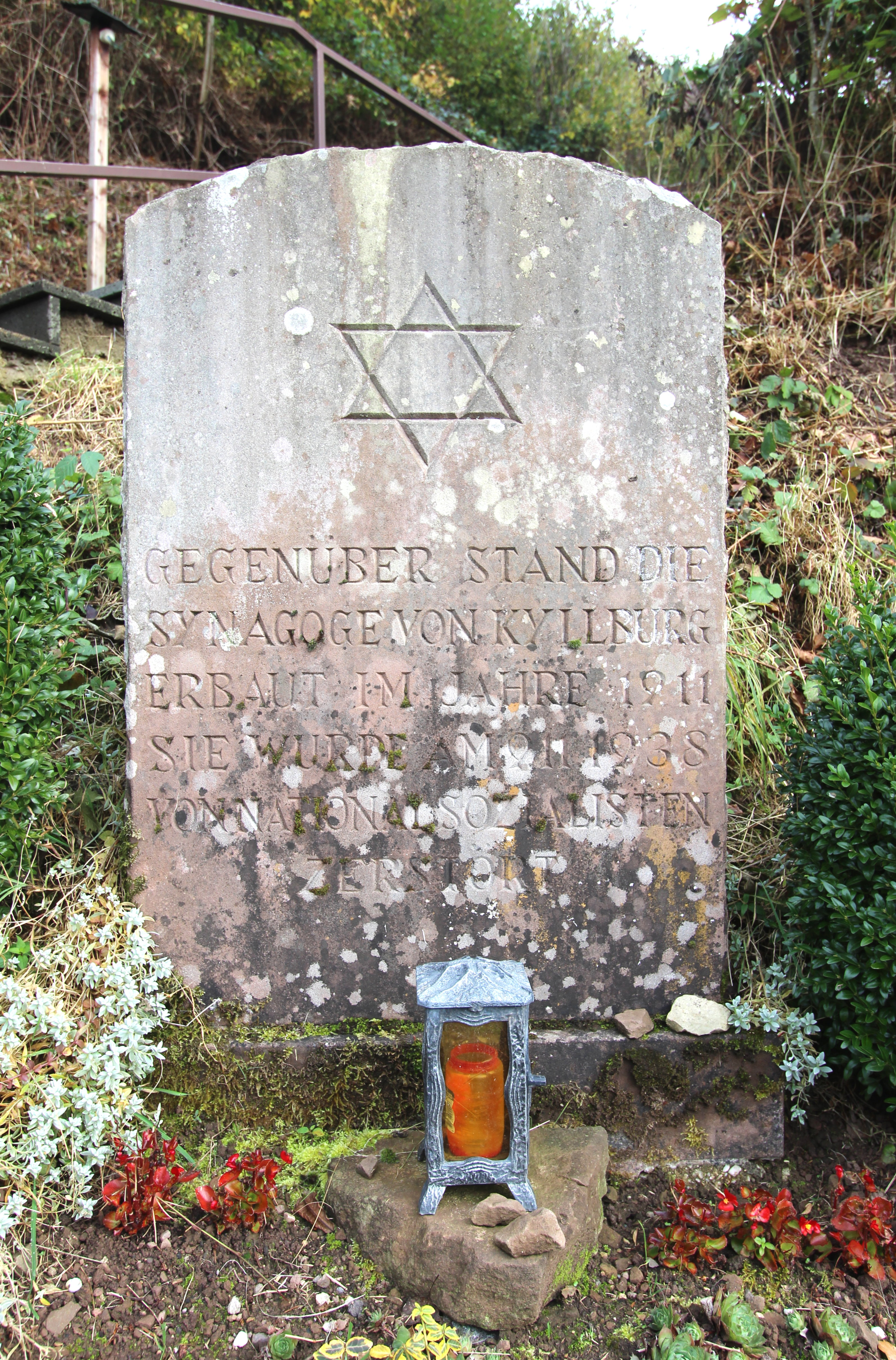 54655 Kyllburg. Die Synagoge von Kyllburg wurde 1911/12 errichtet. Die Synagoge stand in der Marienstraße am Südhang des Annenberges. Aufnahme von 2016.